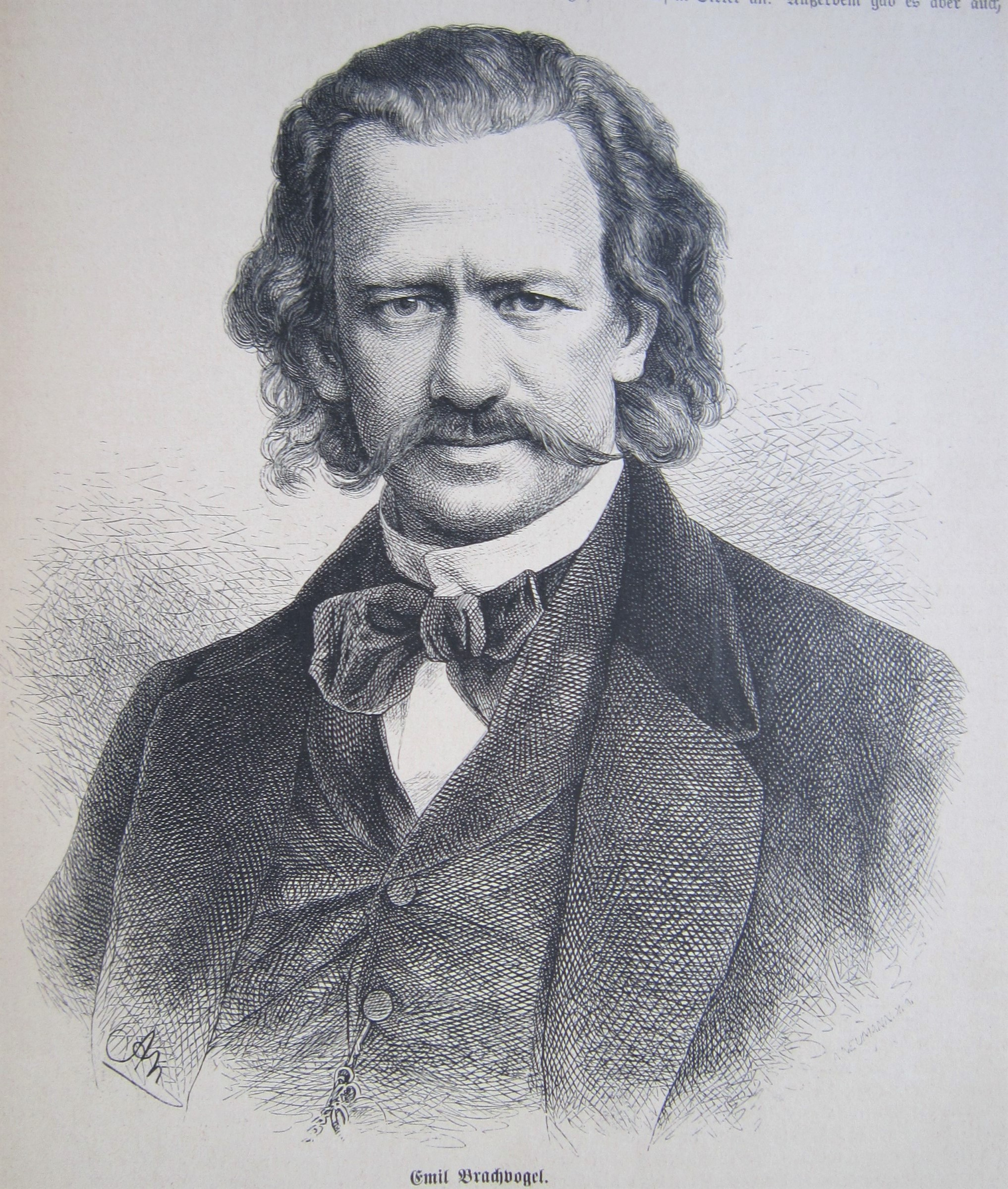 Bildnis des Dichters Adam Emil Brachvogel, auf Holz gezeichnet von Adolf Neumann nach einer Fotografie